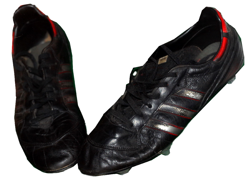 Футболните обувки на легендарният играч на ЦСКА Сф и Националният отбор на България - Иван Колев.